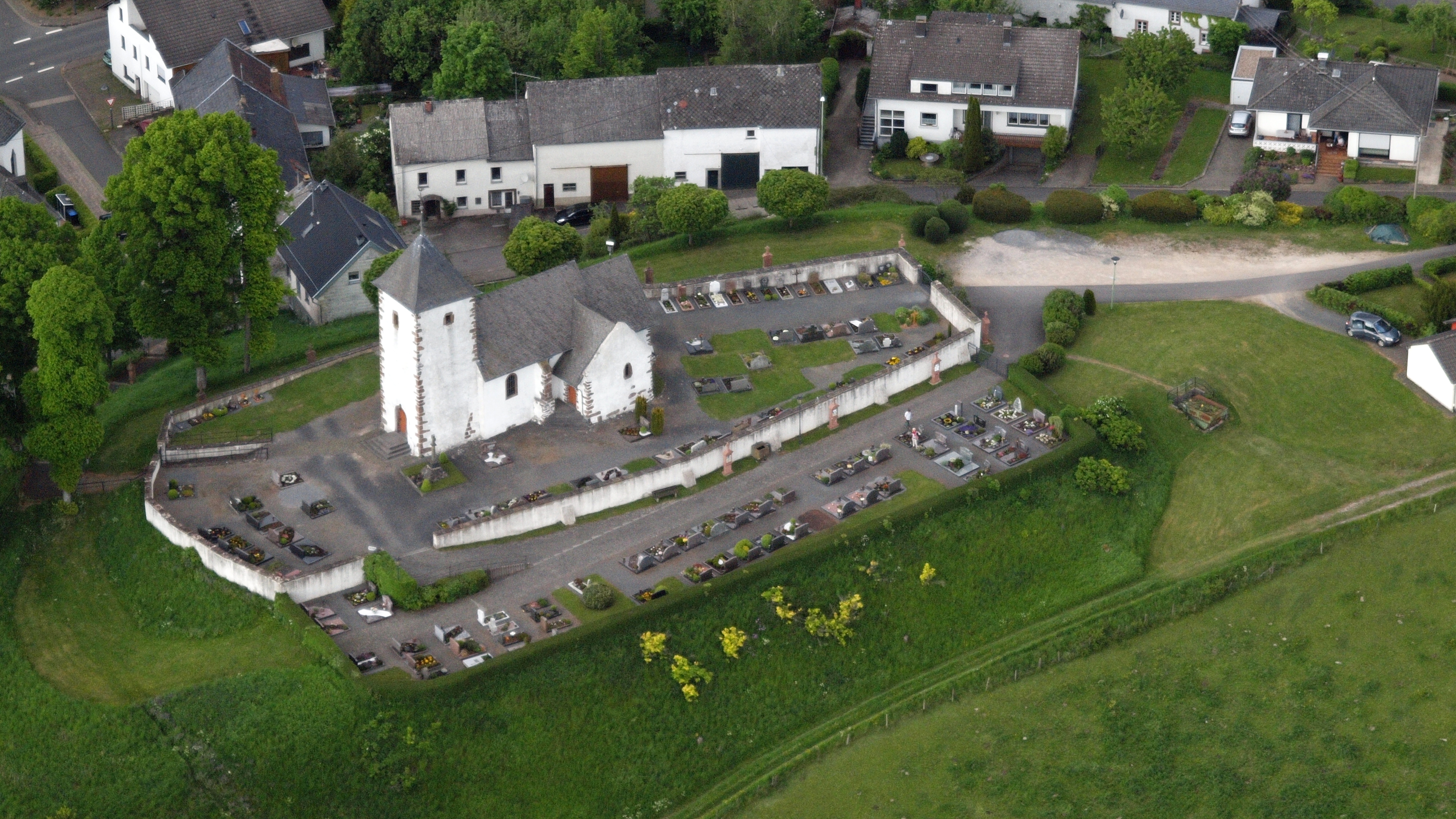 Berndorf (Eifel), Wehrkirche